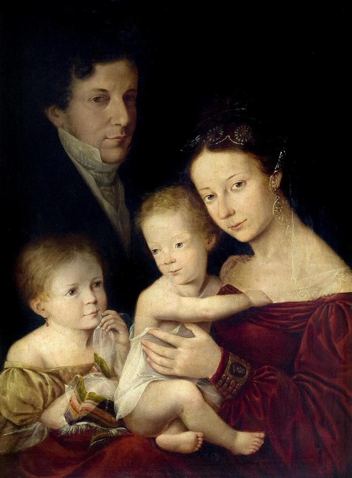 Retrato que representa al escritor, militar y político Ángel de Saavedra (1791-1865), duque de Rivas y grande de España, junto a su familia. Este escritor, cuya obra literaria más conocida es Don Álvaro o la fuerza del sino, fue quien pintó este cuadro de su propia familia en el año 1830.